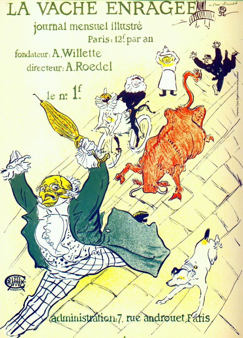 Couverture de la revue de la Vache enragée